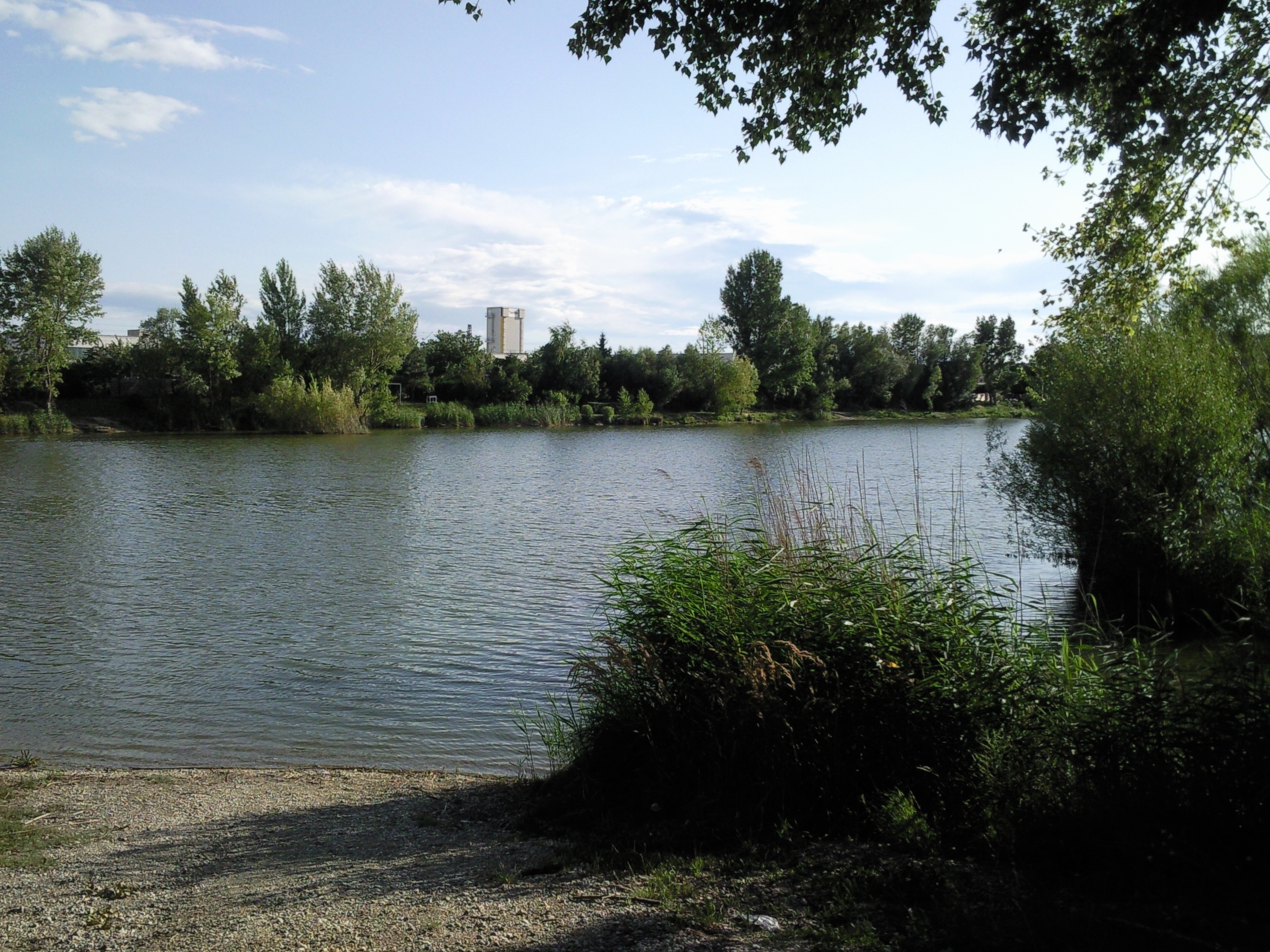 Kalné jazero lake, Bratislava